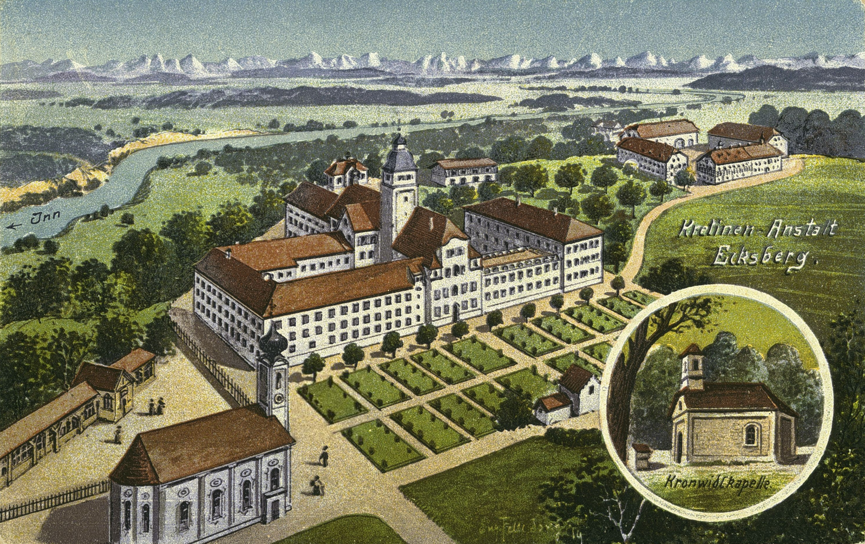 Kretinenanstalt Ecksberg (Mühldorf am Inn), unten Kirche St. Salvator, rechts eingeblendet die Kronwidlkapelle